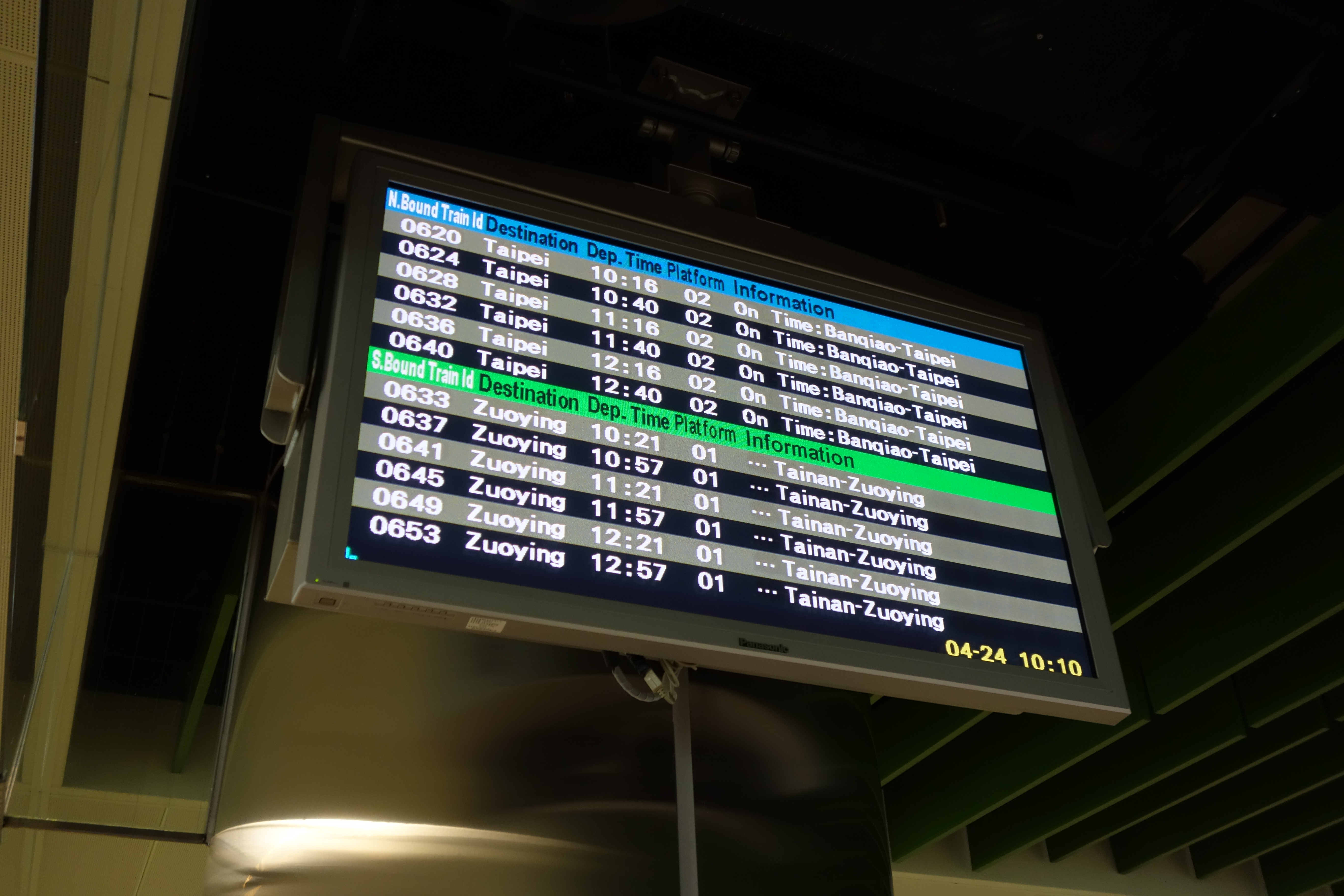 台湾高鐵桃園駅運行案内 Panasonic TH-50PH10